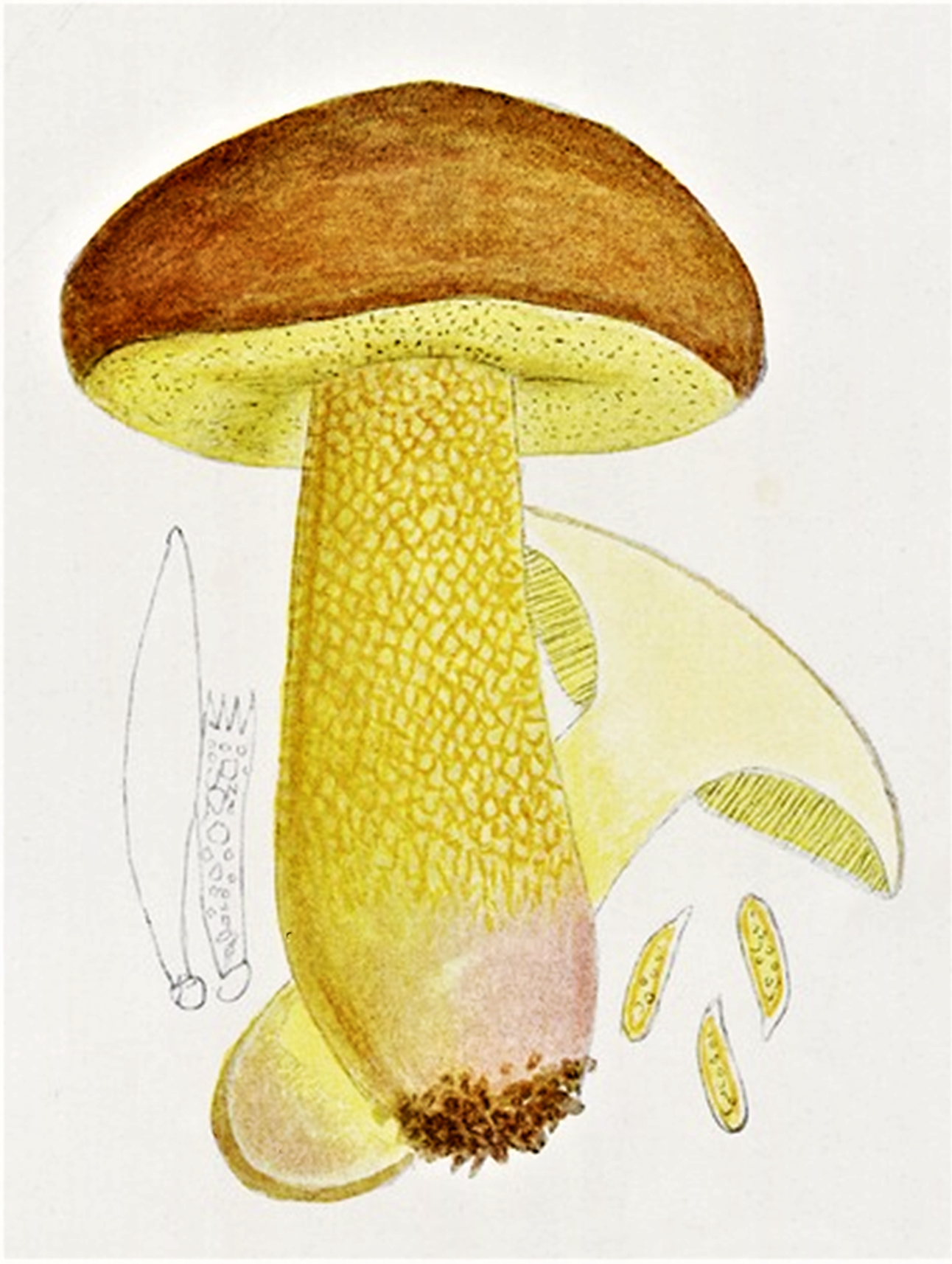 Giacomo Bresadola: = Boletus appendiculatus (Anhängselröhrling) Schaeff. (1774)